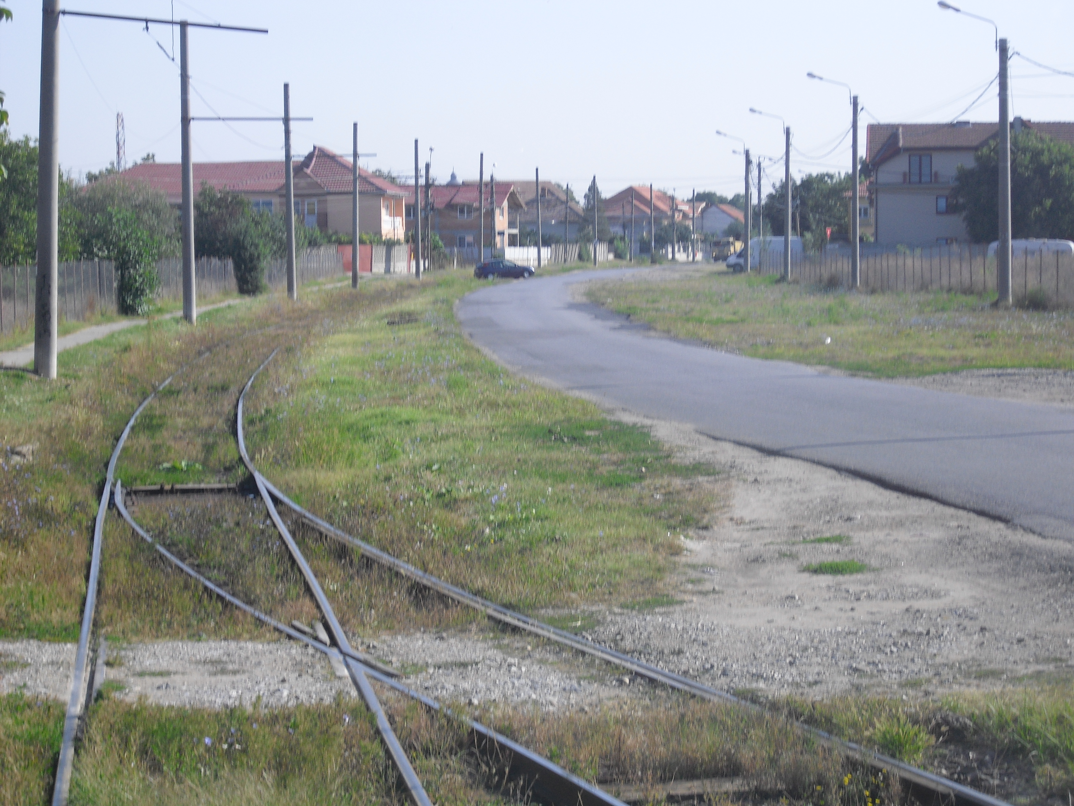 Straßenbahn in Timişoara (Rumänien)